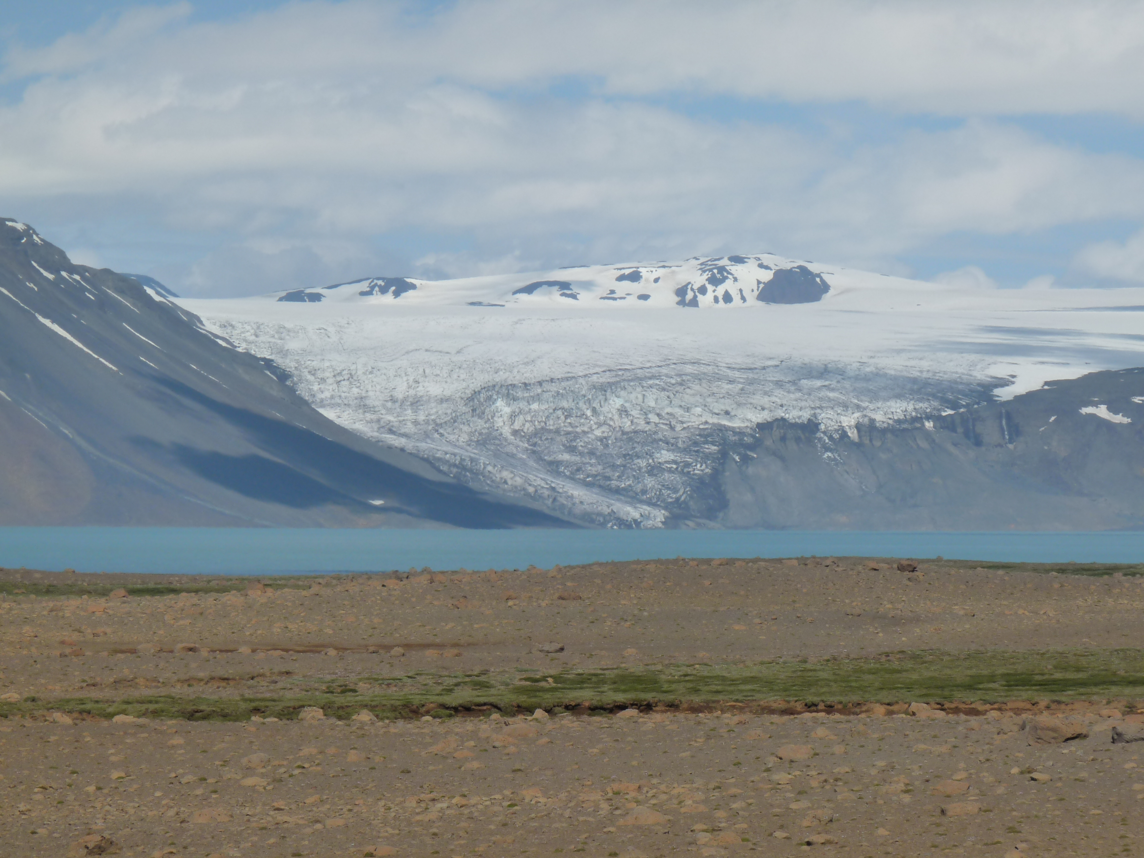 Uktzicht bij de halte Hvítárnes Crossroads